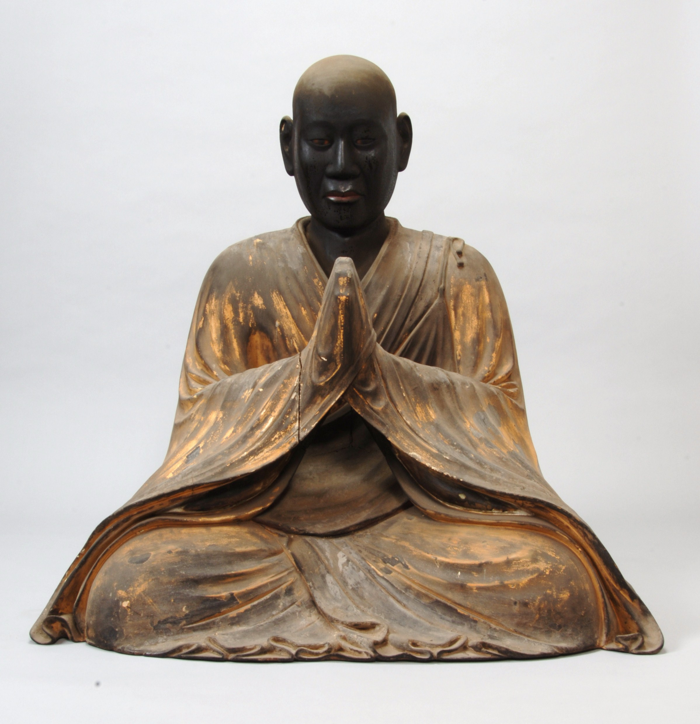 木食応其坐像 木造 像高84.7cm